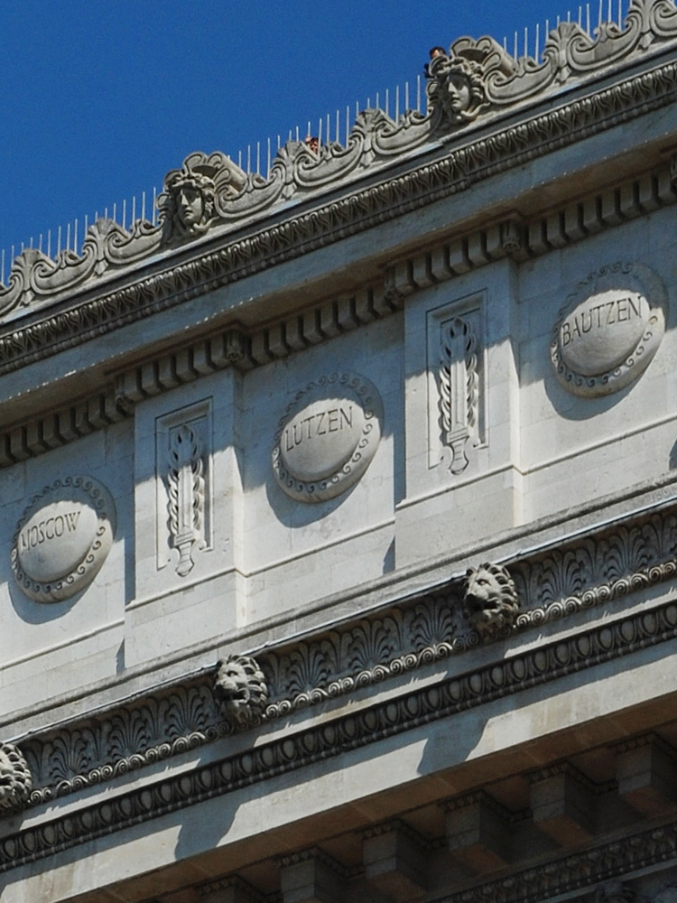 Detail vom Triumphbogen in Paris: Moscow, Lutzen und Bautzen, drei der dreißig Schilde mit den Namen von Kriegsschauplätzen der Koalitionskriege.